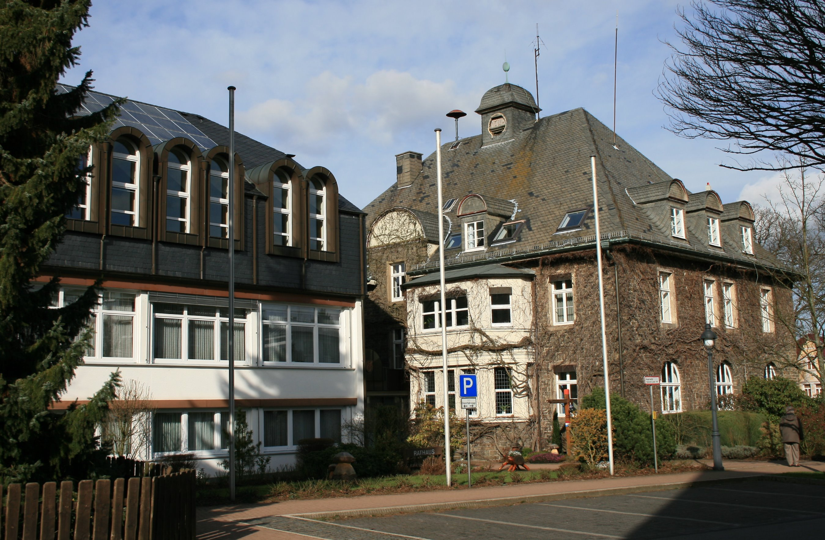 Rathaus in Neuenrade.